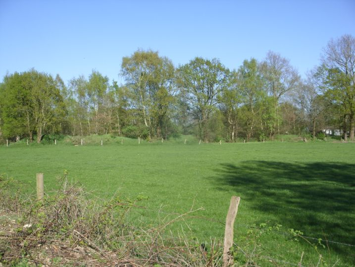 Blick zum Naturschutzgebiet „Sandgrube Pirgo“